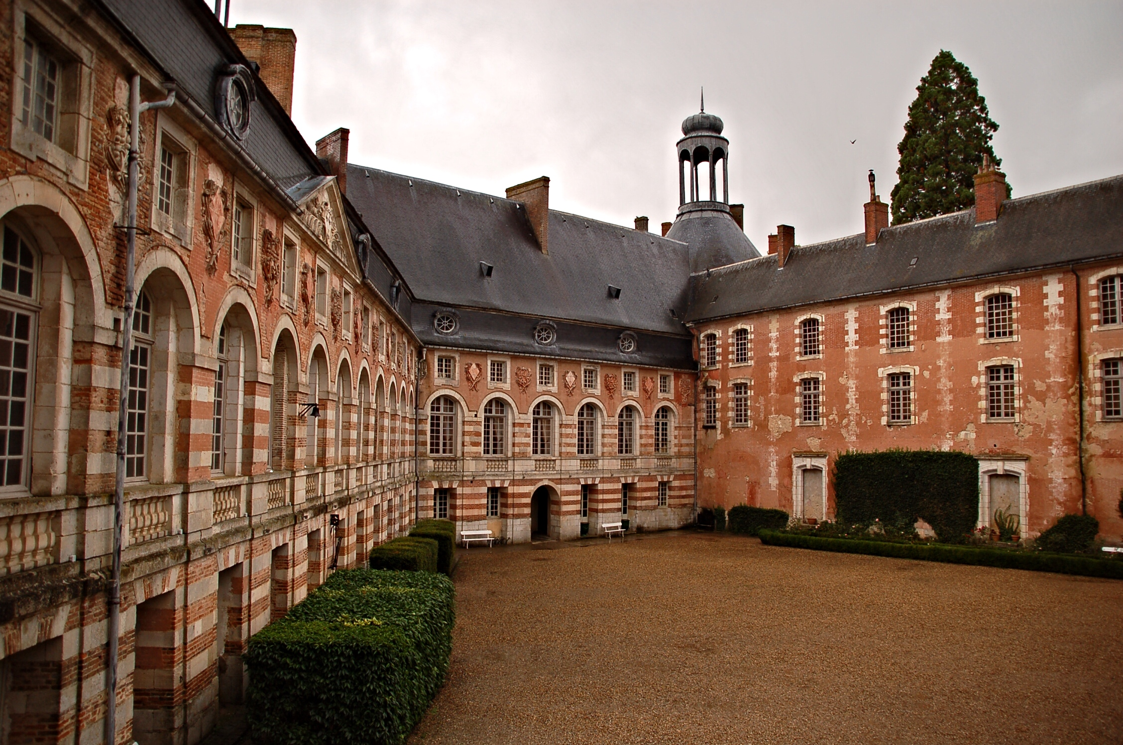 Cour du château de Saint-Fargeau